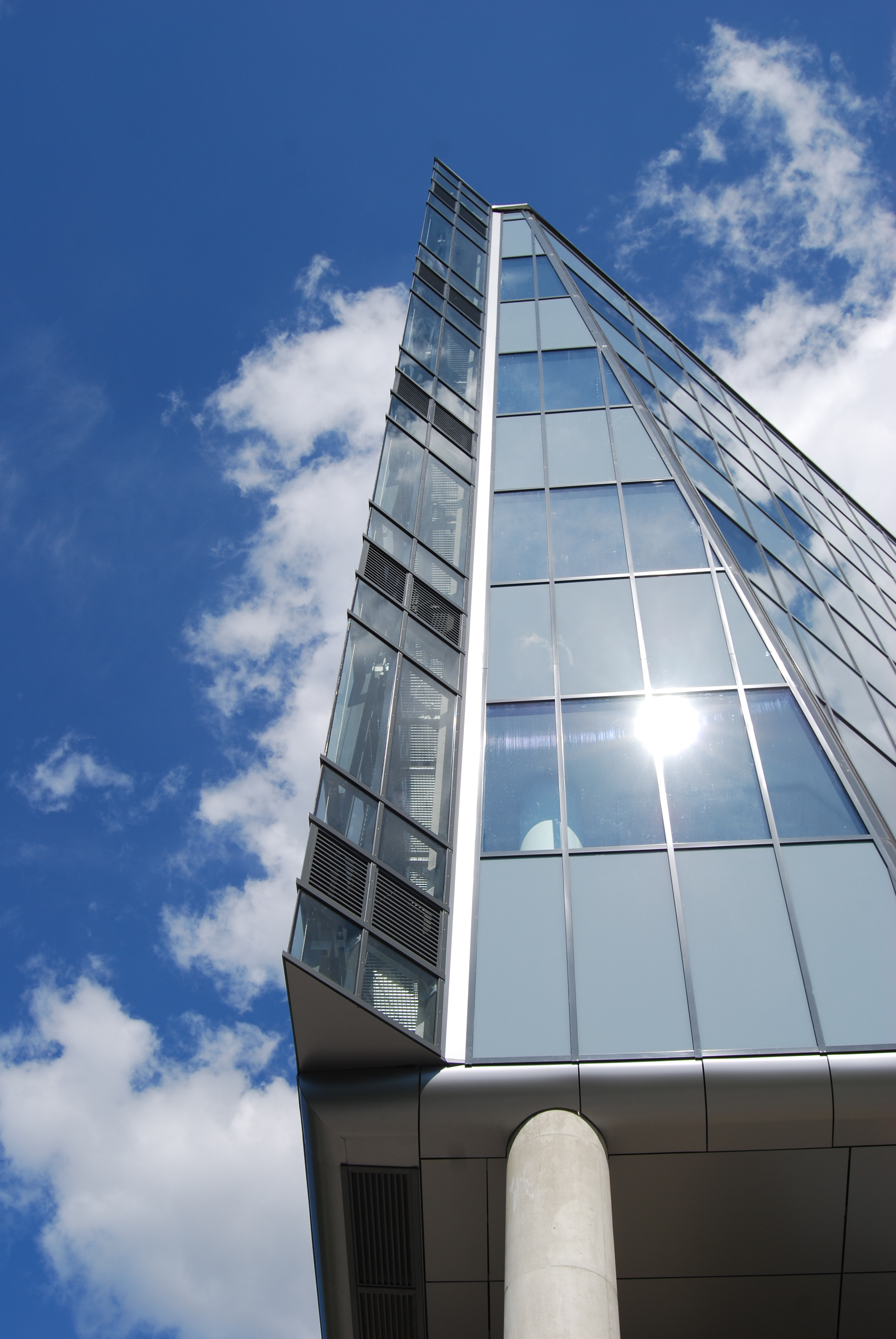 Budova Vedeckého parku Univerzity Komenského v Bratislave